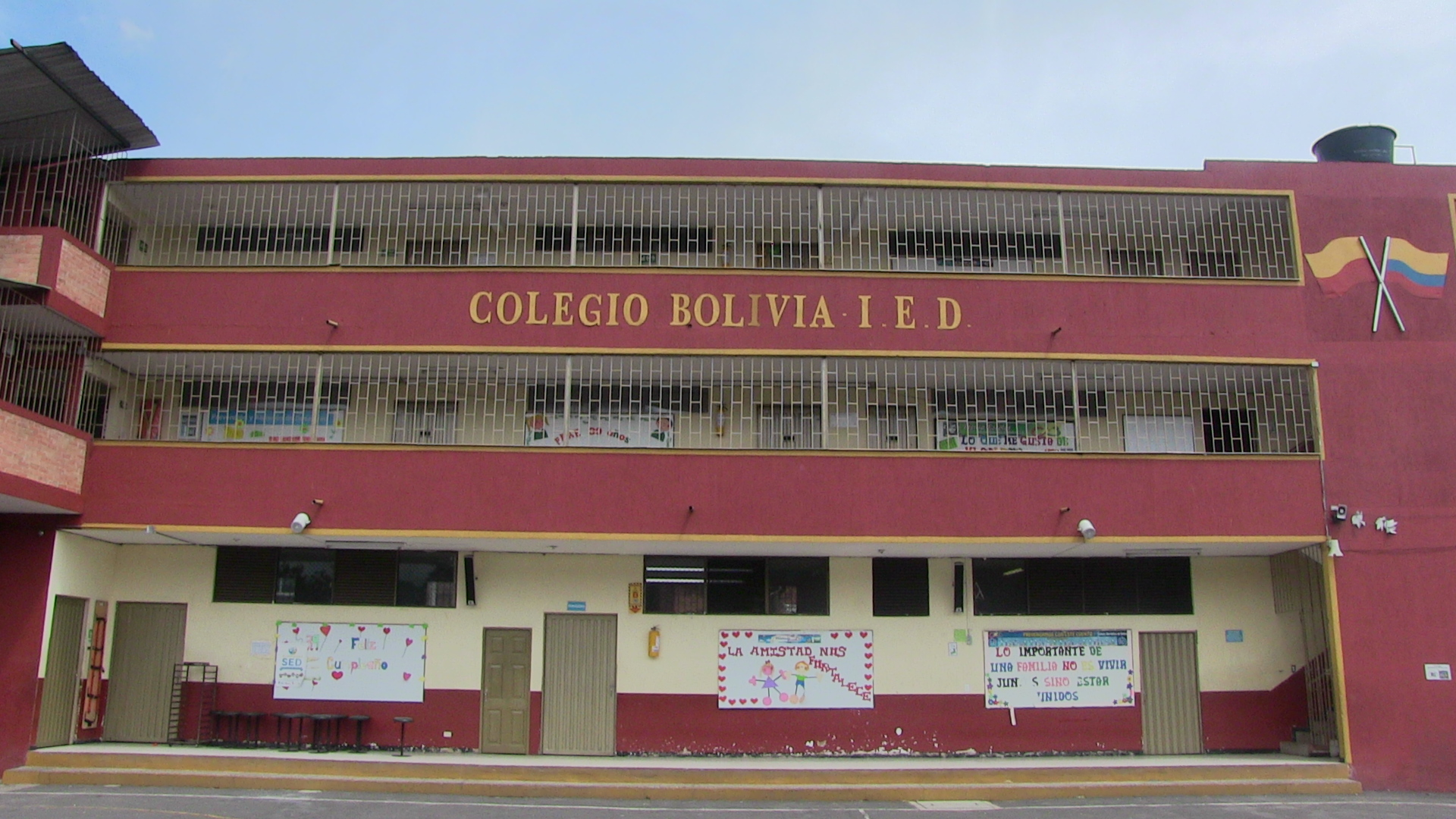 Fachada Colegio Bolivia I.E.D.